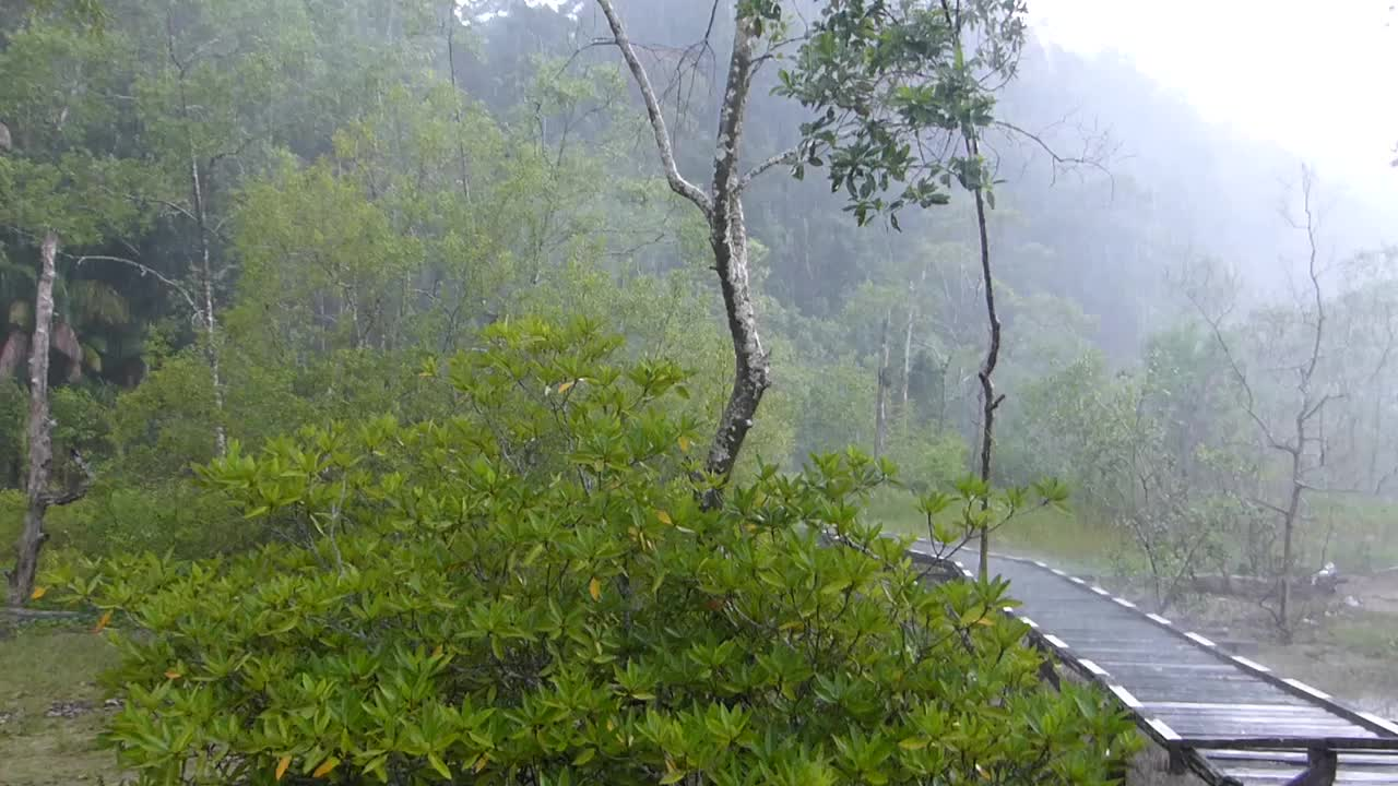 Bako NP, Sarawak, MALAYSIA